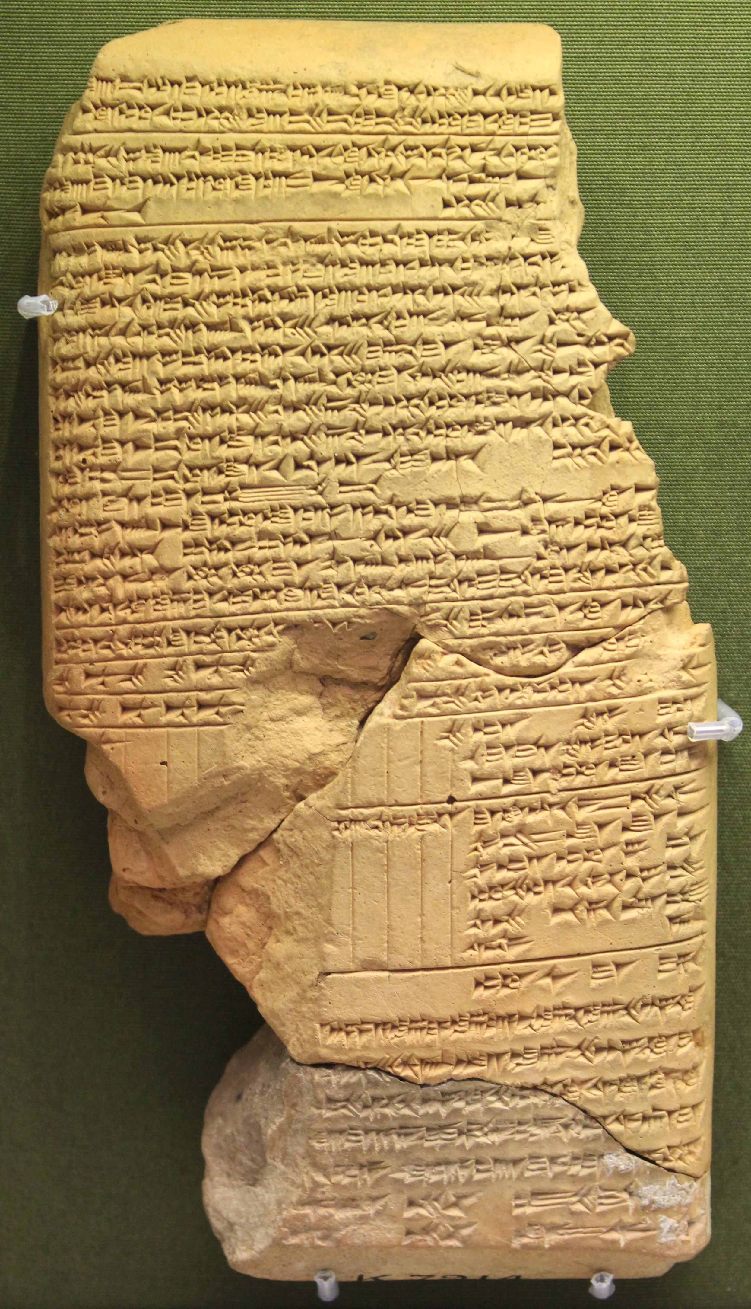 Tablette du "Manuel du devin", ouvrage d'astrologie, mise au jour à Ninive, provenant de la Bibliothèque d'Assurbanipal. ME K.2847.